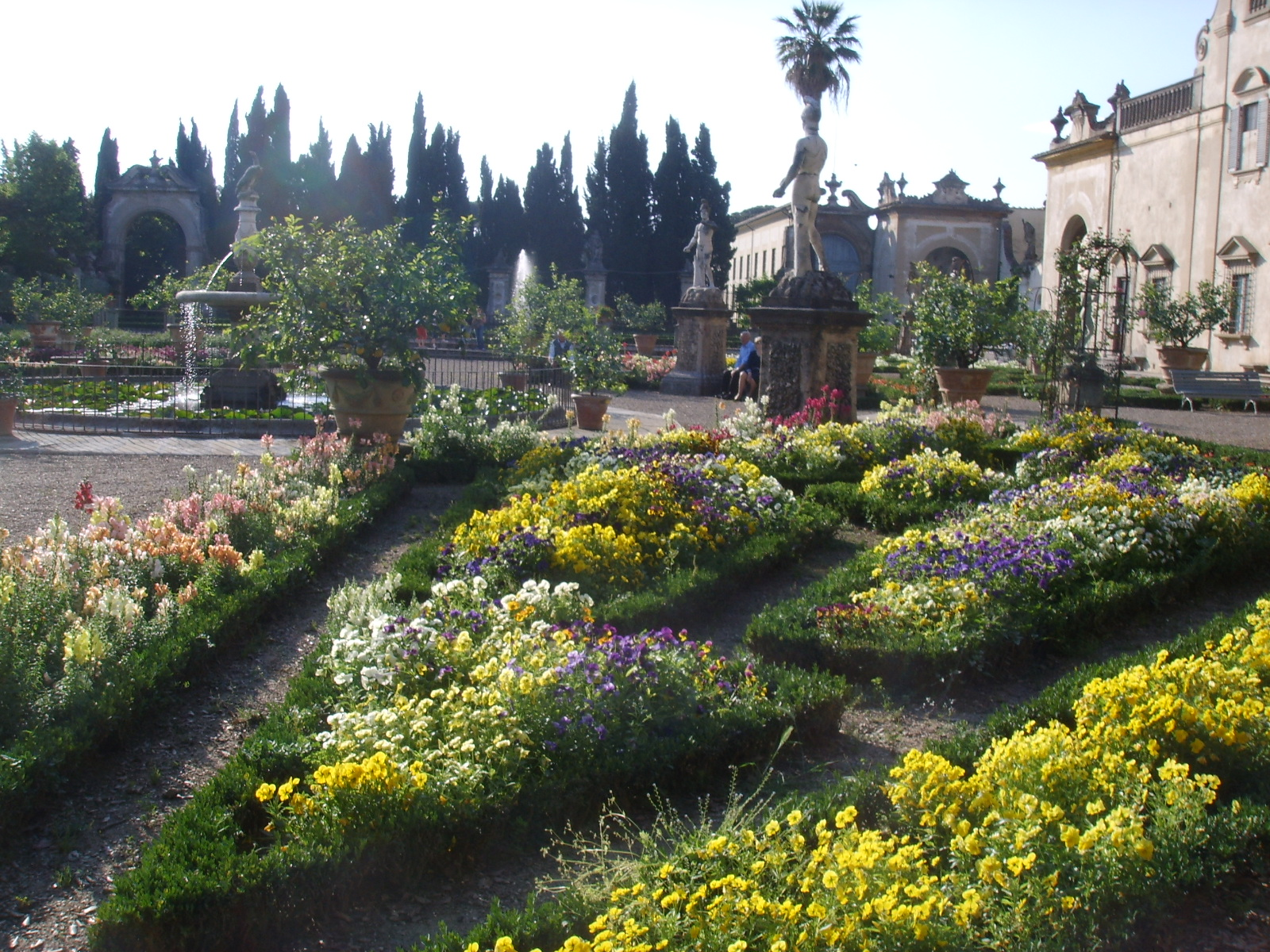 Villa guicciardini corsi salviati, giardino